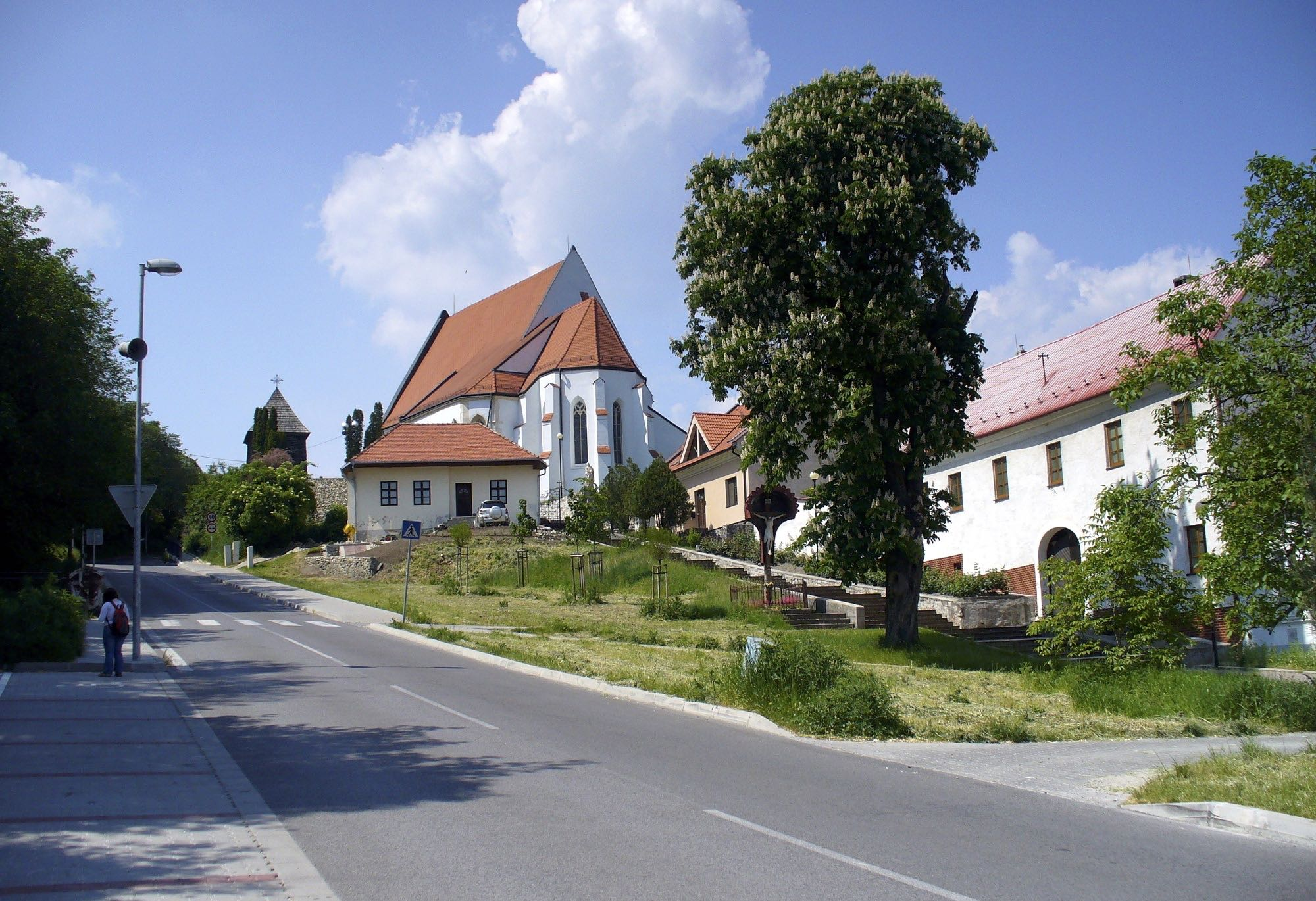 Kostol svätého Juraja